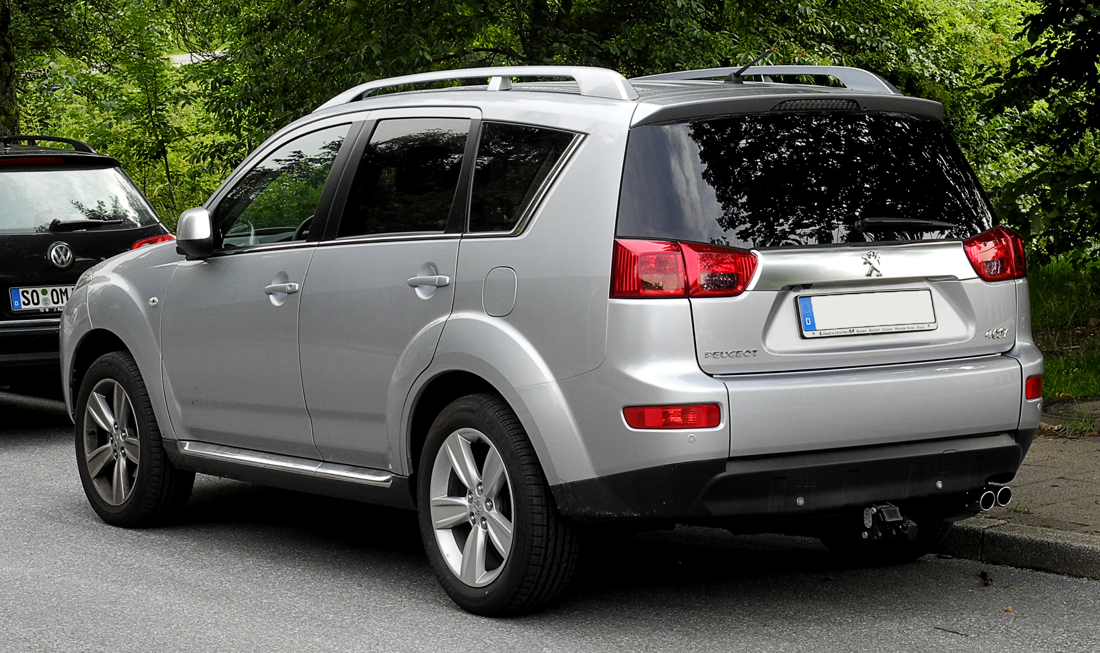 Peugeot 407 HDi FAP 155 Platinum